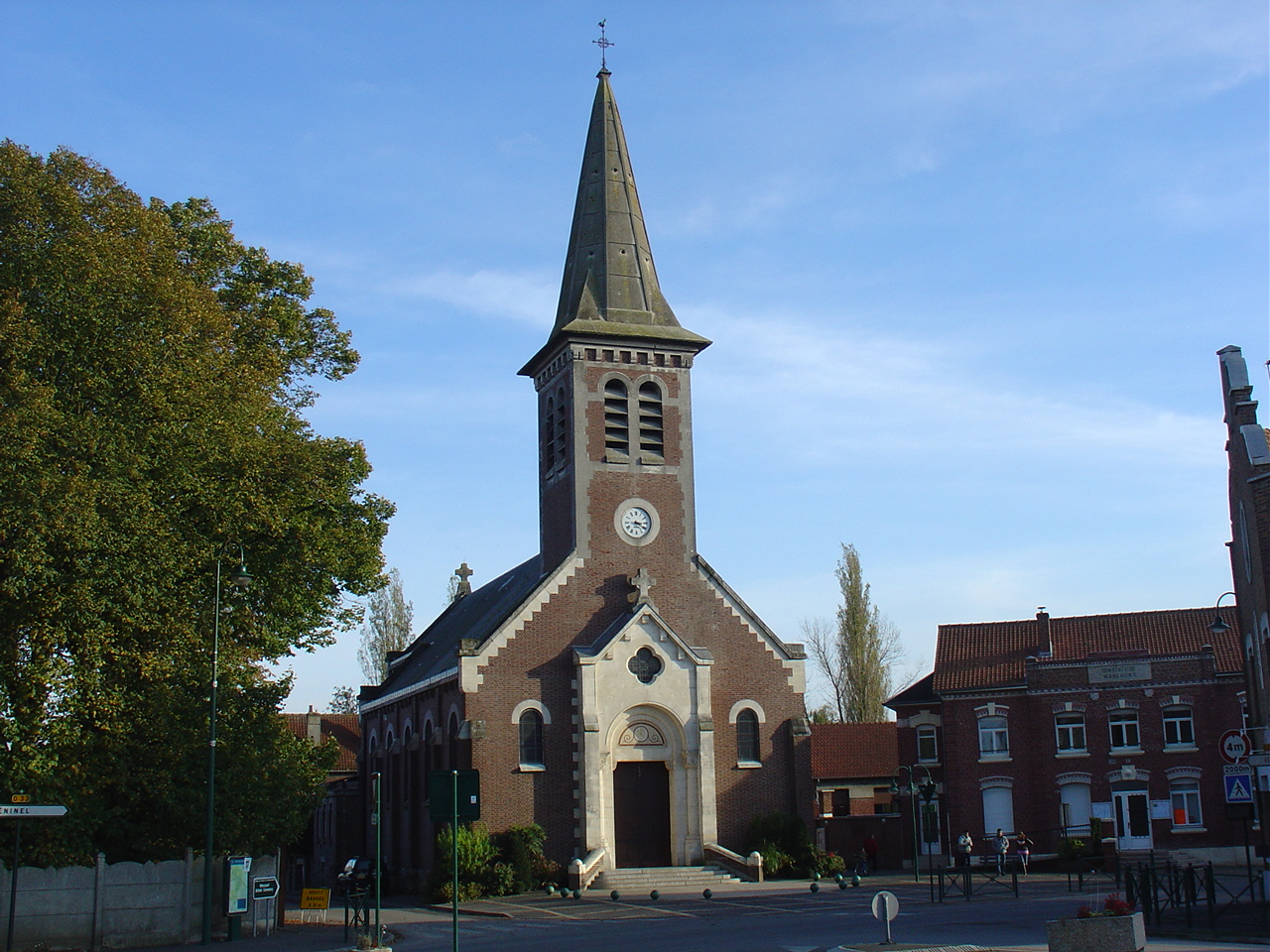 Église de Wancourt